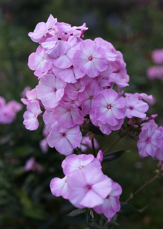 Флокс метельчатый 'Цветущая Сакура'